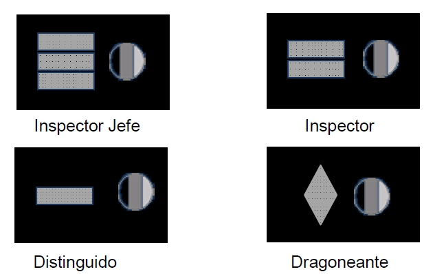 Presillas para el personal de sub-oficiales y dragoneantes en uniforme de fatiga del cuerpo de custodia y vigilancia nacional del INPEC